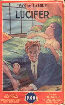 Couverture de Lucifer de Jean de La Hire aux éditions Tallandier (1939)